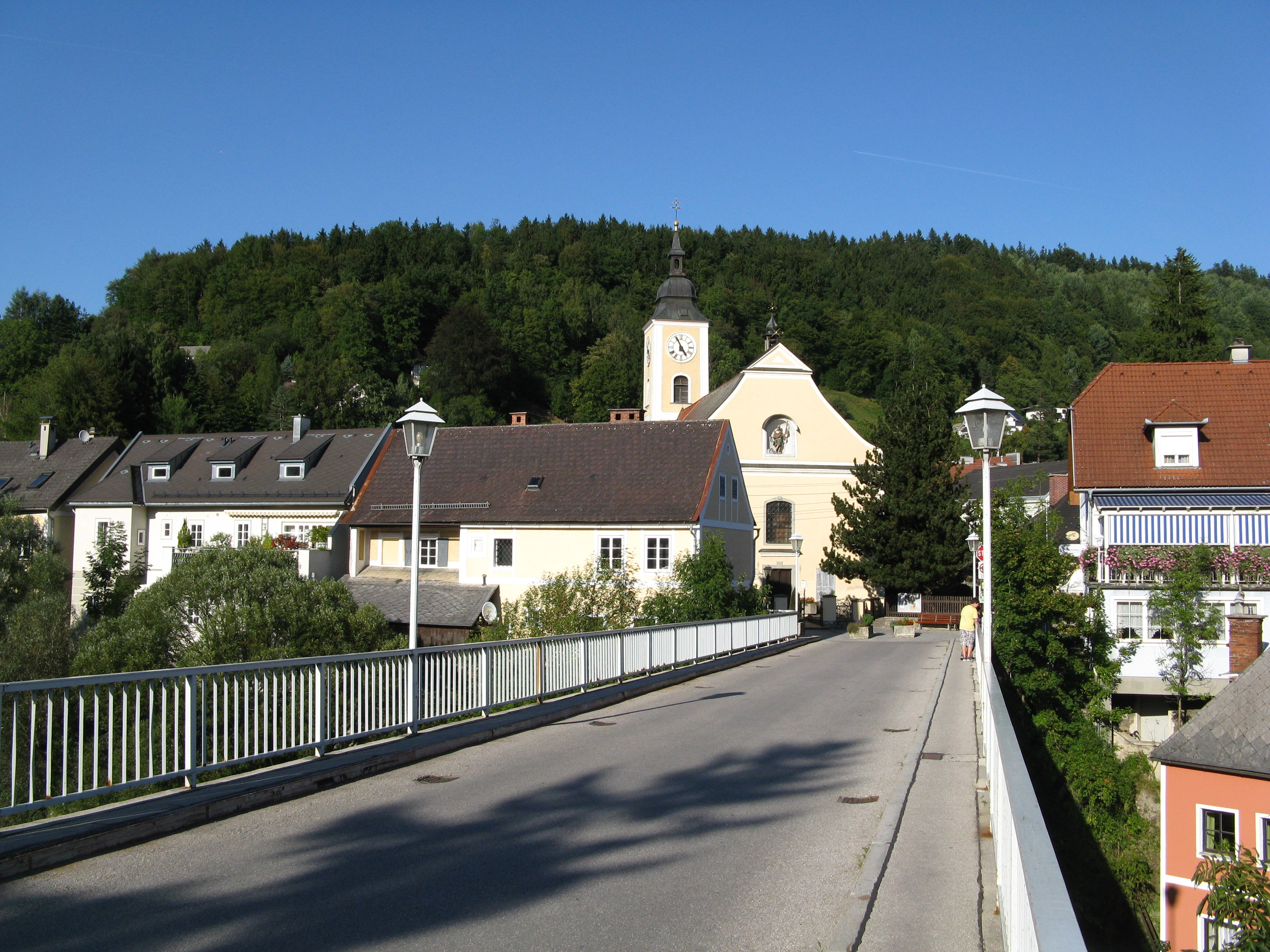 Zeller Hochbrücke/ Obere Zeller Brücke